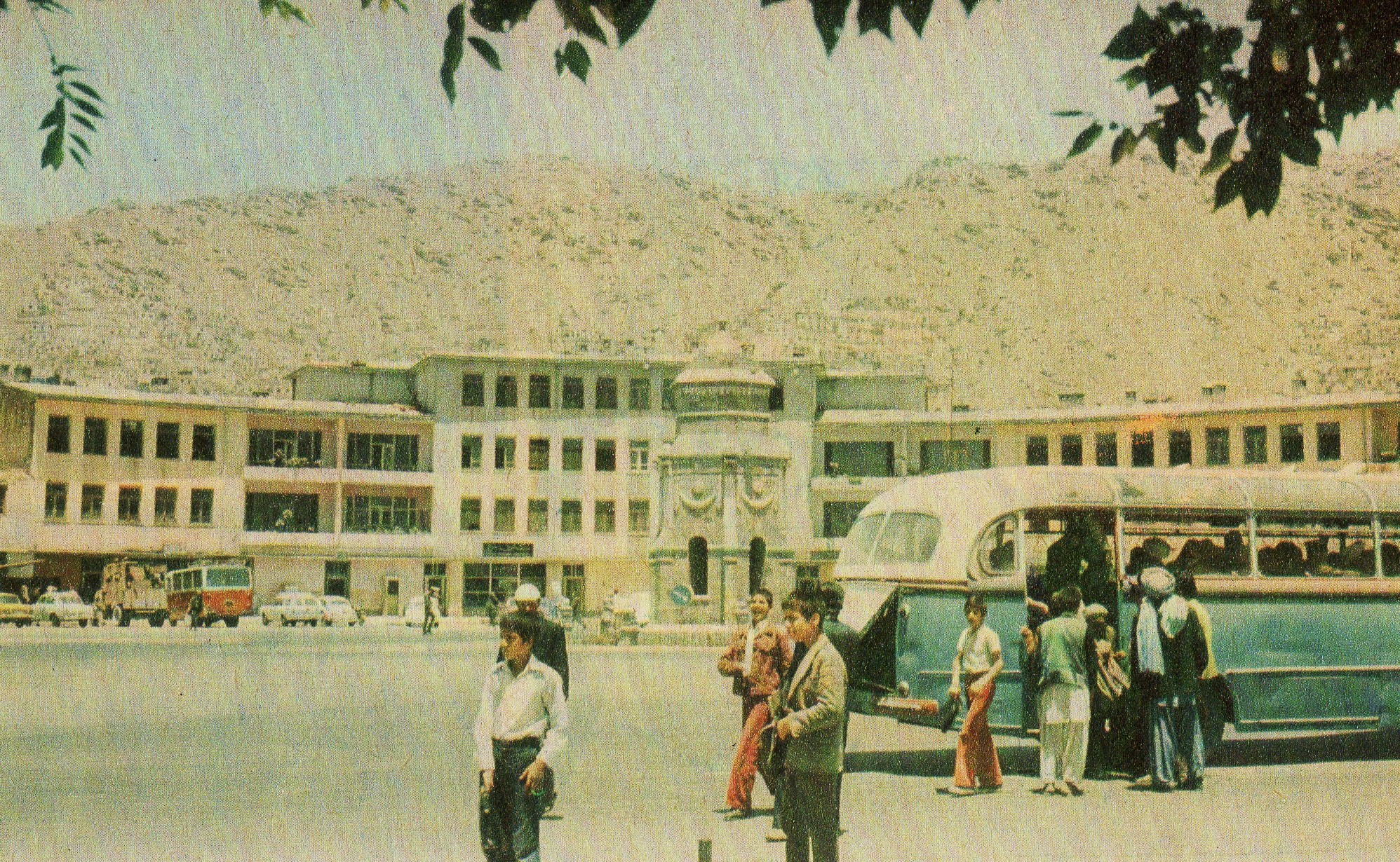 Centrum Kabulu w 1978r.